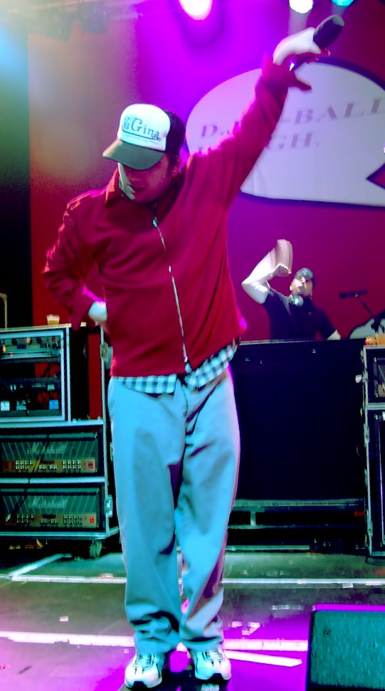 Jimmy Pop